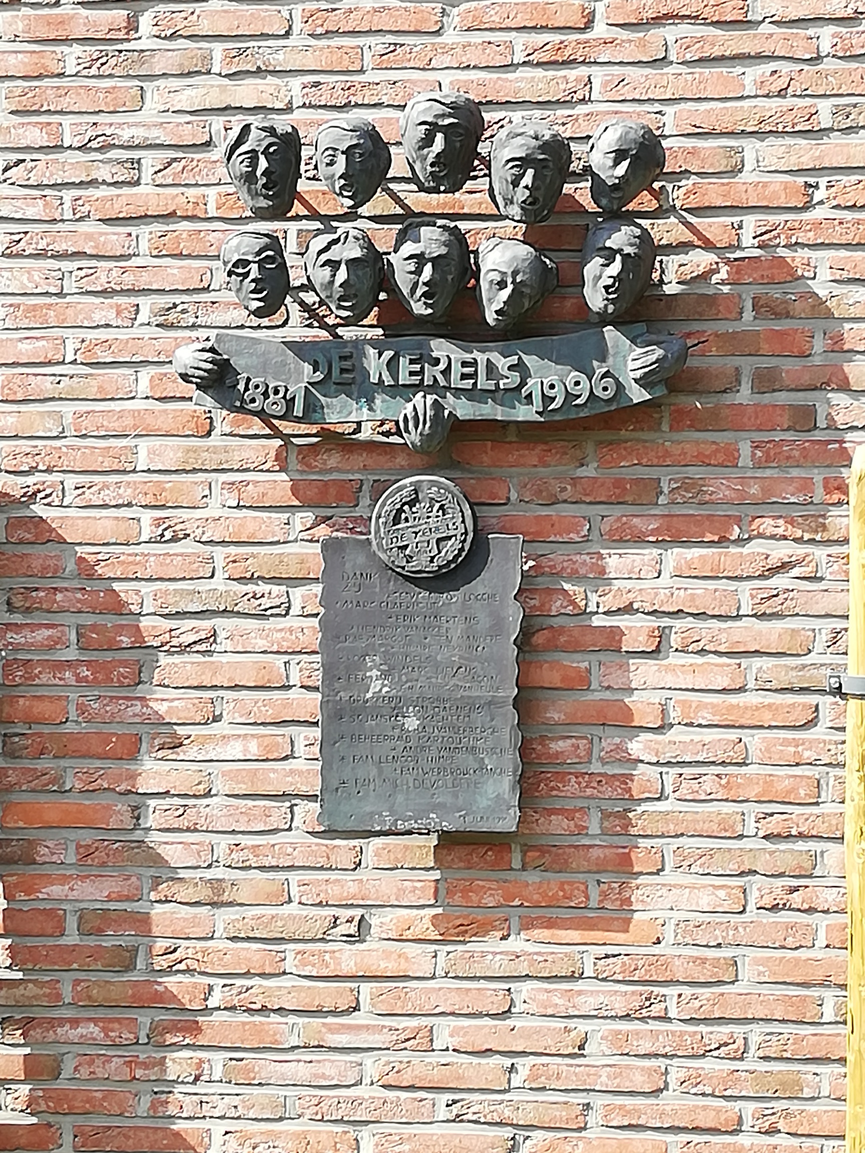 Kuntwerk De Kerels ingehuldigd op 1 juni 1996 ter gelegenheid van het 115 jarig bestaan, te vinden aan het Dorpshuis van Emelgem